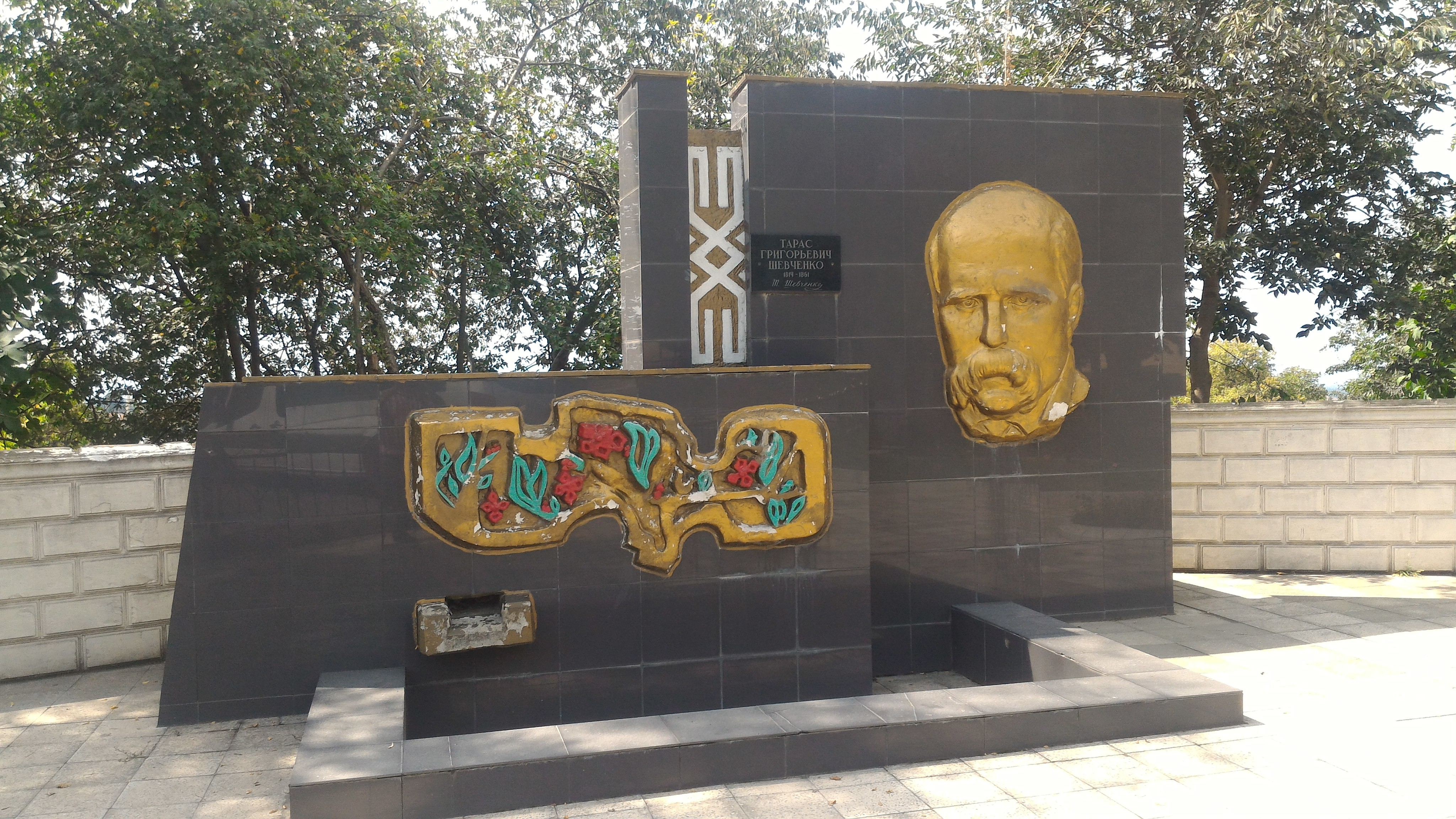 Ukrayna şairi, rəssam, mütəfəkkir, inqilabçı-demokrat, Ukrayna ədəbiyyatı və təsviri sənətində tənqidi realizmin və inqilabi-demokratik cərəyanın banisidir. Zaqatala şəhərinin mərkəzində H. Əliyev parkı ilə üzbəüz yerləşir.